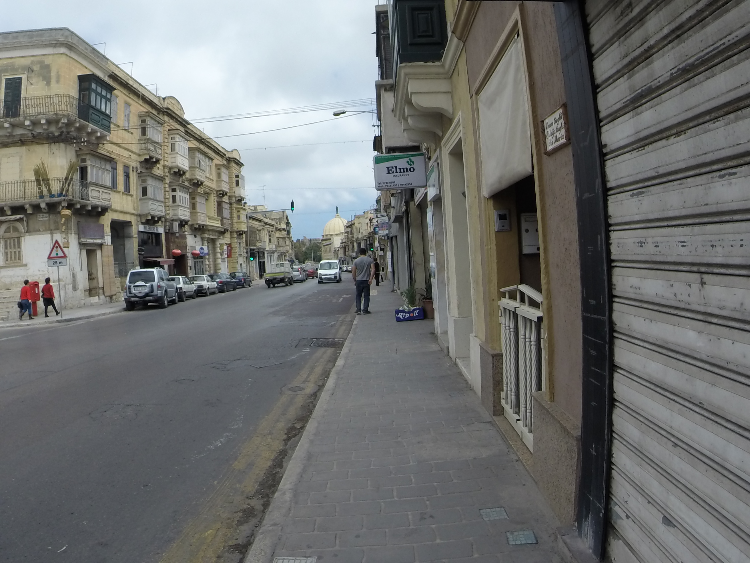 St Joseph High St, Hamrun, Malta